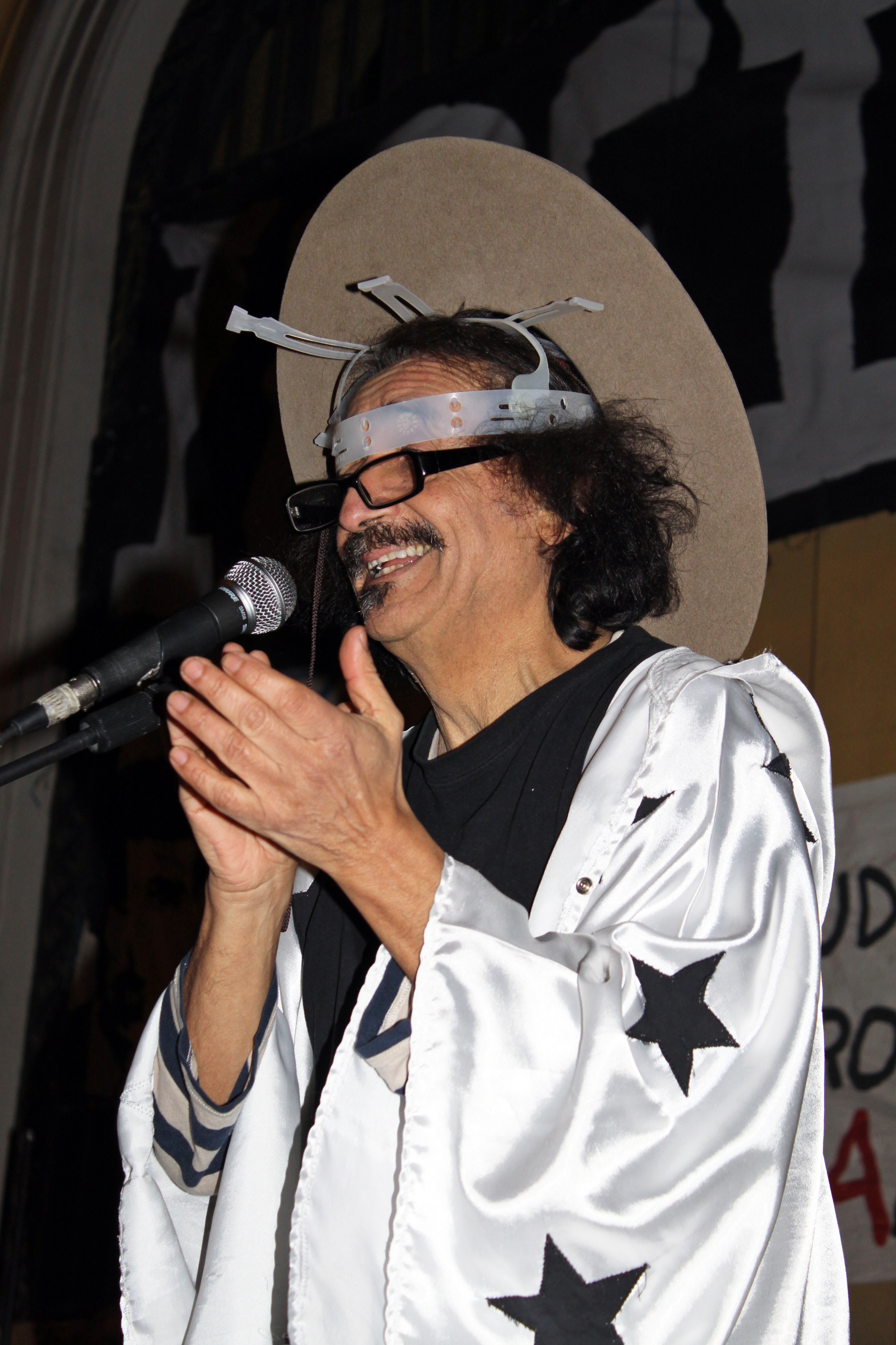 Florcita Motuda en un acto en apoyo a la movilización estudiantil en Chile de 2011.